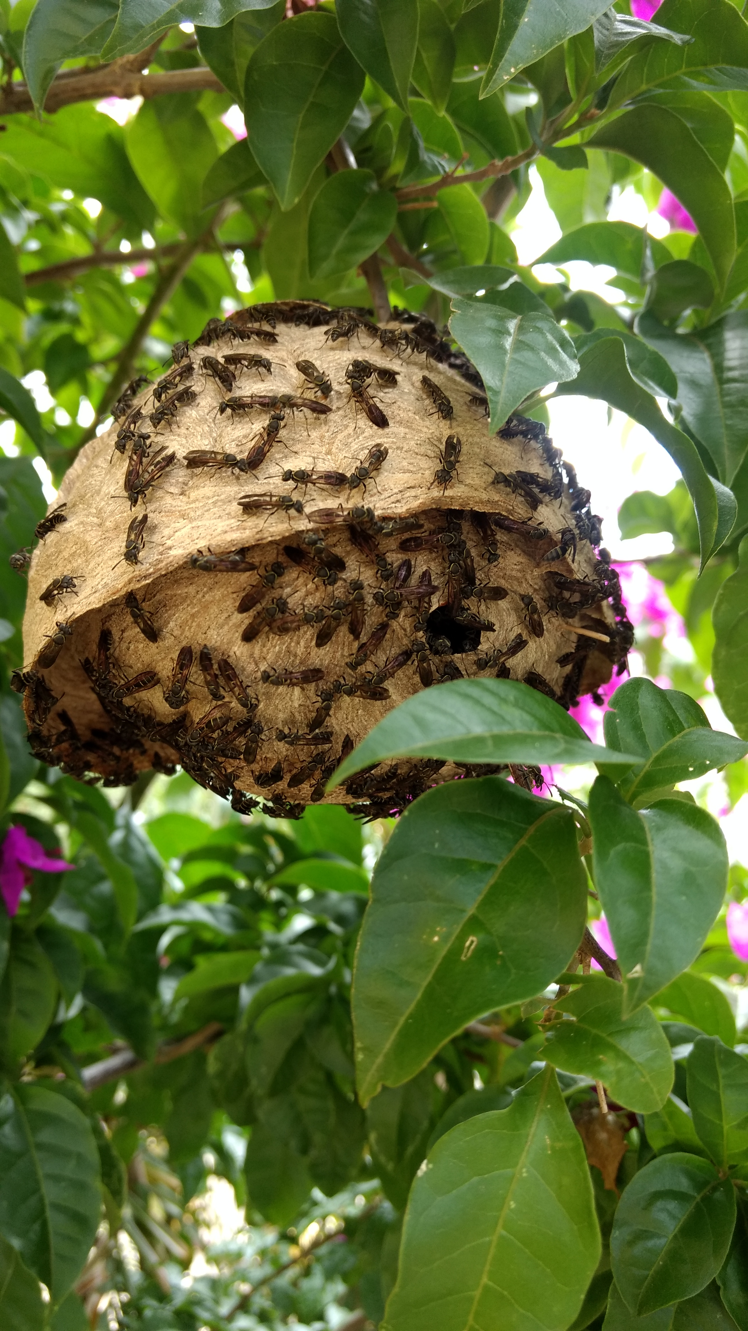 Vespas